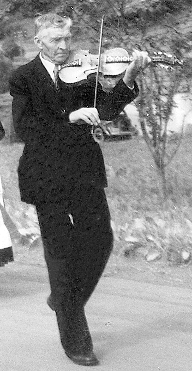 Bildet er tatt i Steinsdalen i Kvam kommune.